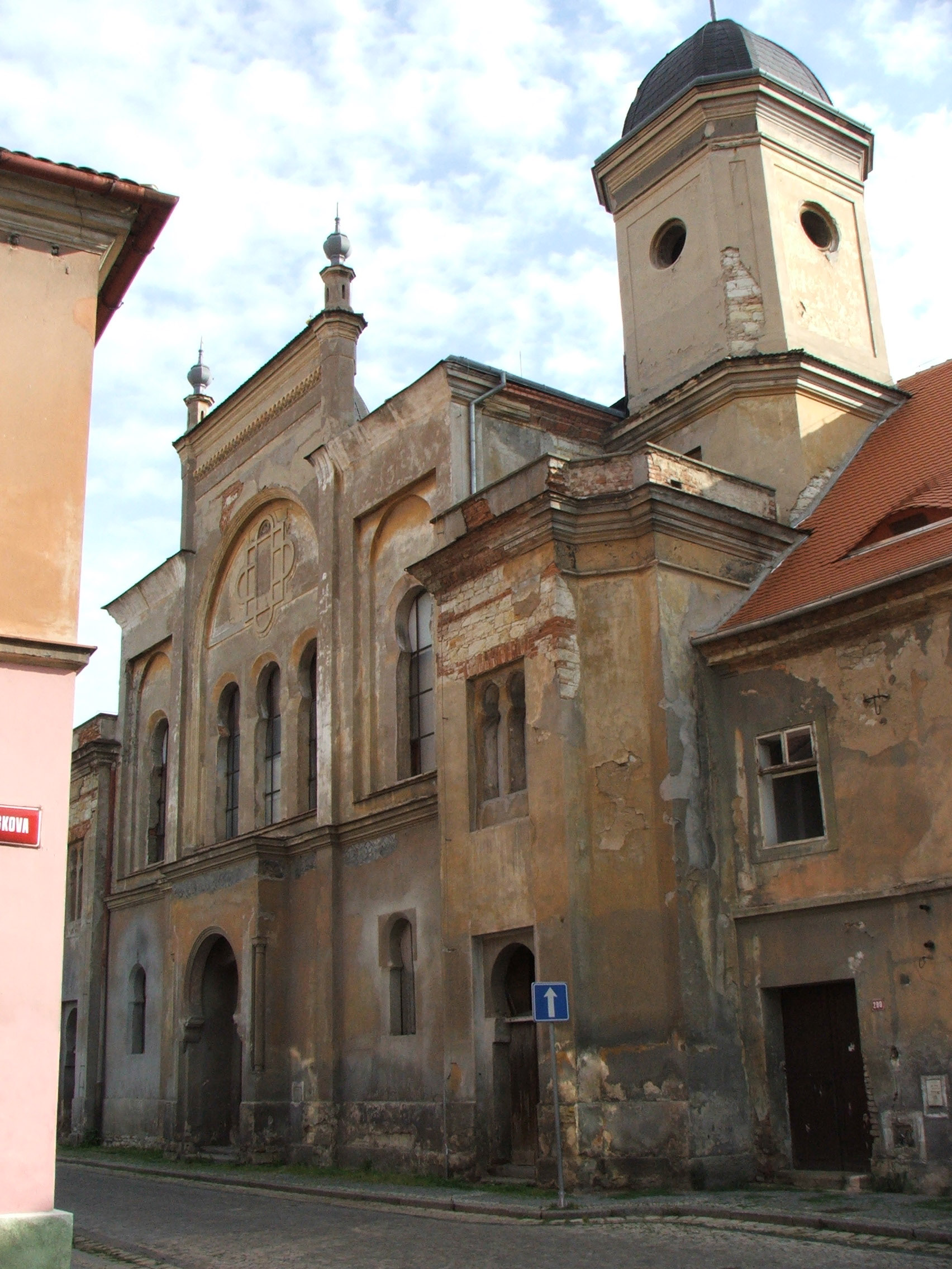 Česky: Synagoga v Žatci. Stavba z let 1870 až 1872 v maurském slohu podle projektu Johanna Stanieka. Vypálena za Křišťálové noci roku 1938, za války využita jako lazaret a pomocná škola, po roce 1949 skladiště.